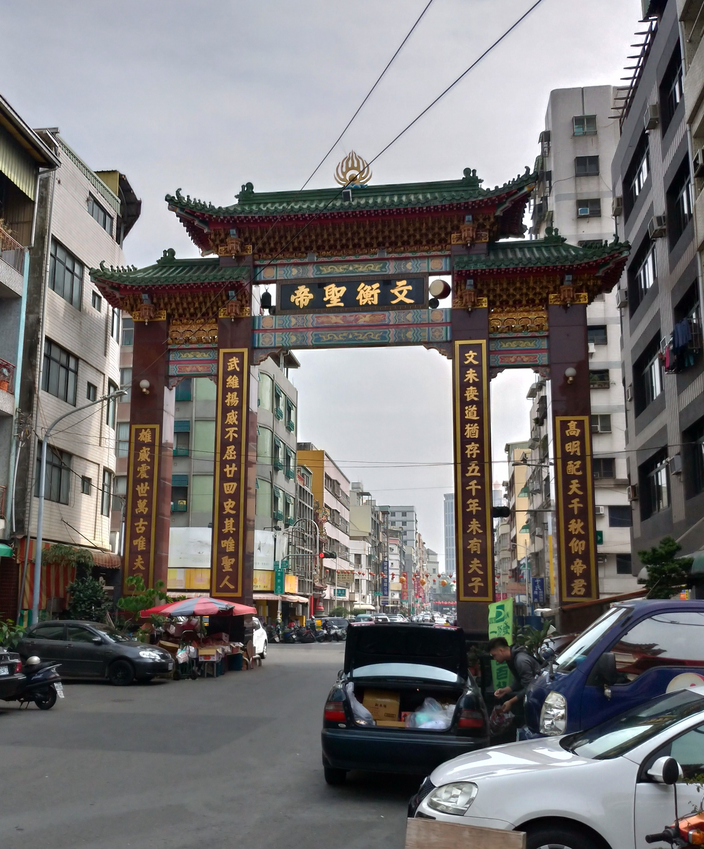 中文（台灣）: 文武聖殿牌樓之背面，上面刻有文衡聖帝四字，莊嚴而端正。；使用本圖片請遵循(CC 姓名標示-非商業性-禁止改作)，Please follow (CC BY-NC-ND 3.0 TW)